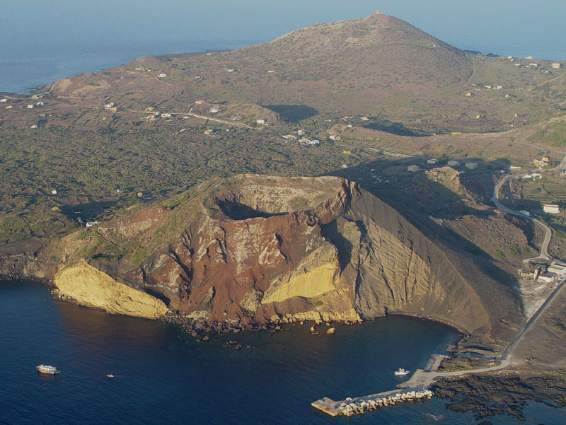 linosa_2